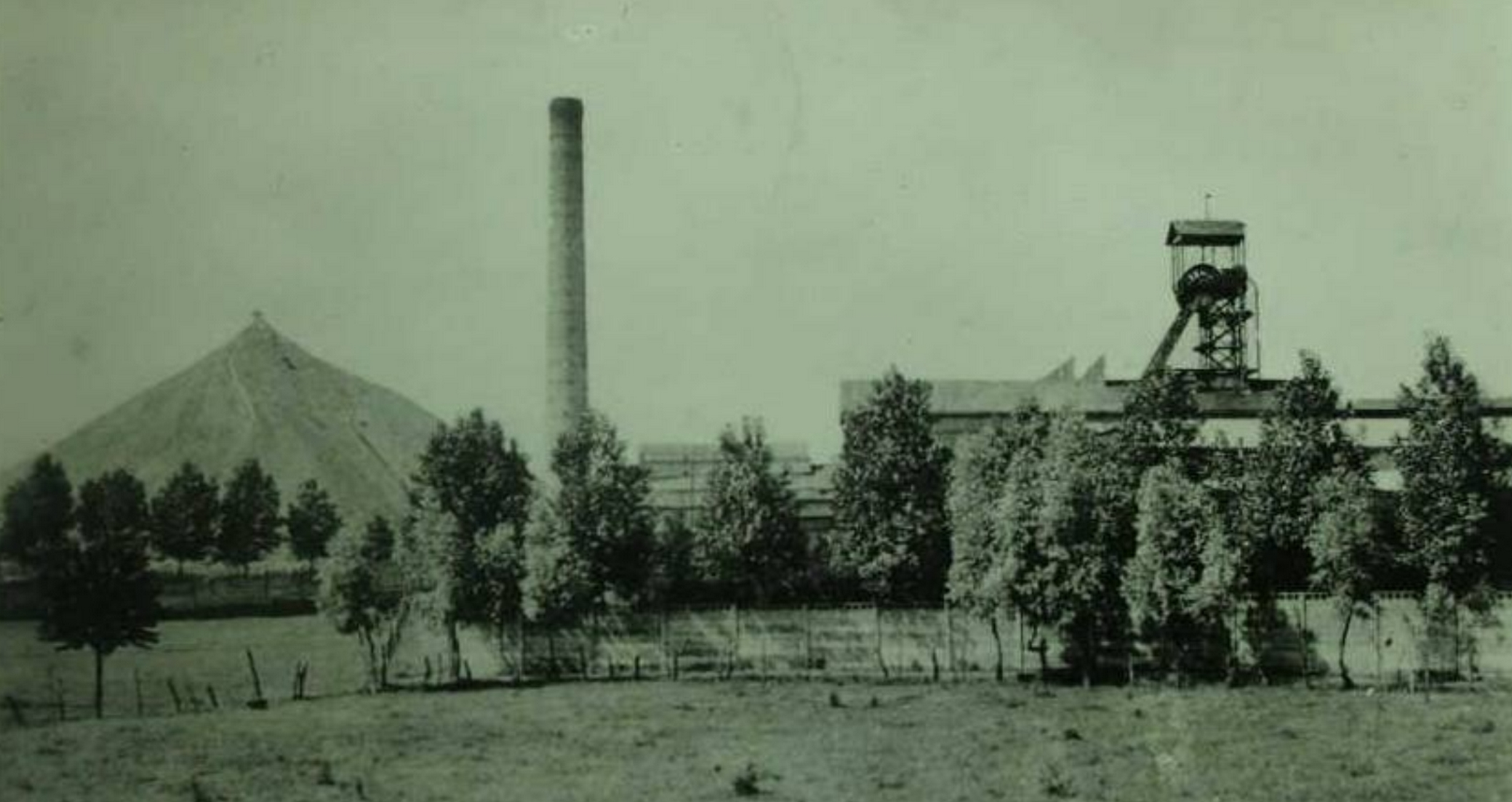 La Fosse n° 7 - 7 bis dite Alphonse Lecocq de la Compagnie des mines d'Ostricourt était un charbonnage constitué de deux puits situé à Ostricourt, Nord, Nord-Pas-de-Calais, France.